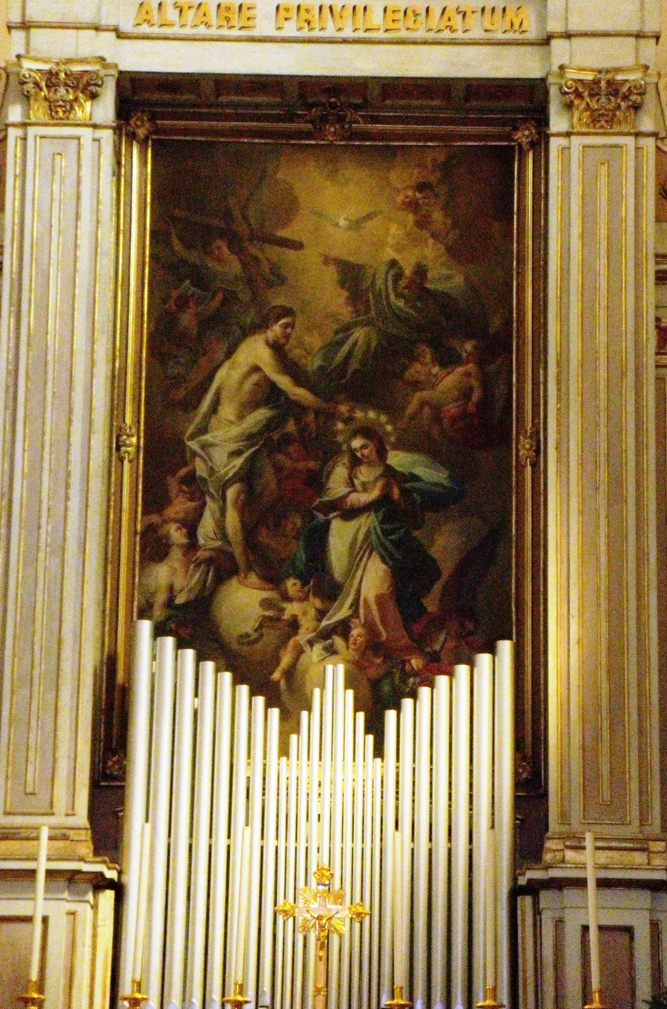 Particolare dell'altare maggiore della Cattedrale di Cerreto Sannita. Lienzo de Michele Foschini